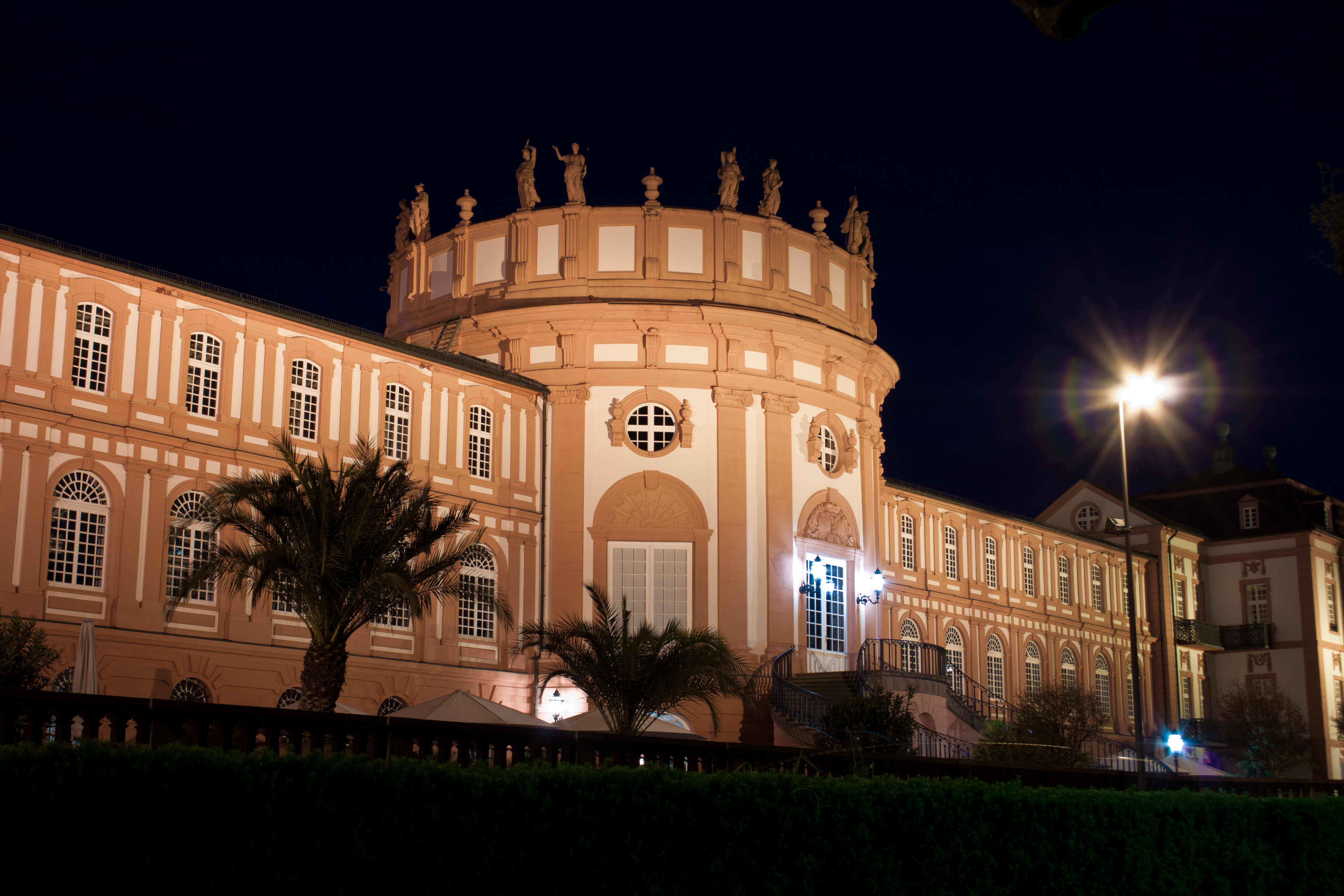 Die dem Rhein zugewandte Seite des Biebricher Schlosses bei Nacht.